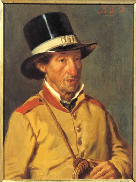 Badischer Postillion; Öl auf Malpappe, 23,1 x 17,1 cm